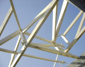 exp_charpente